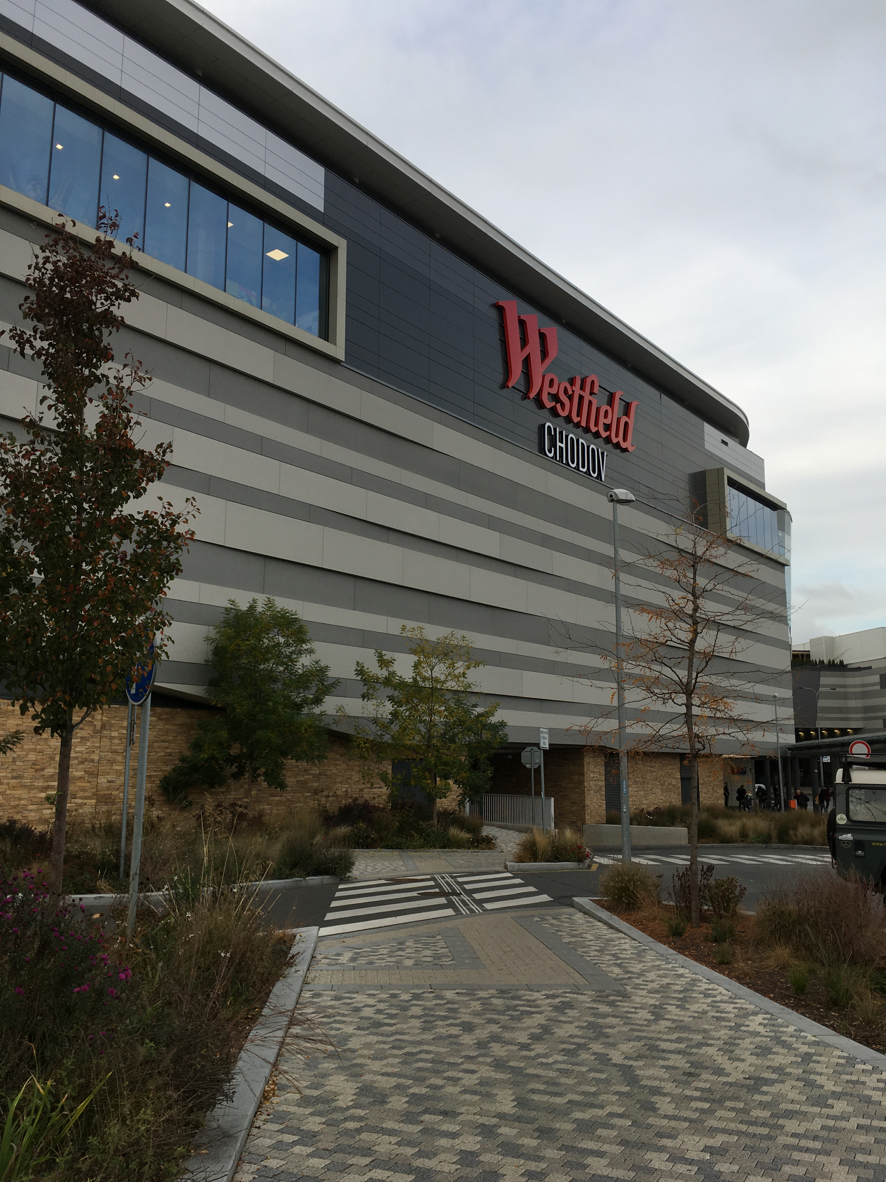 Westfield Chodov